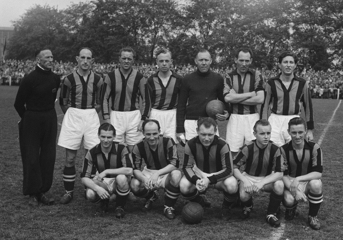 DWS elftal.